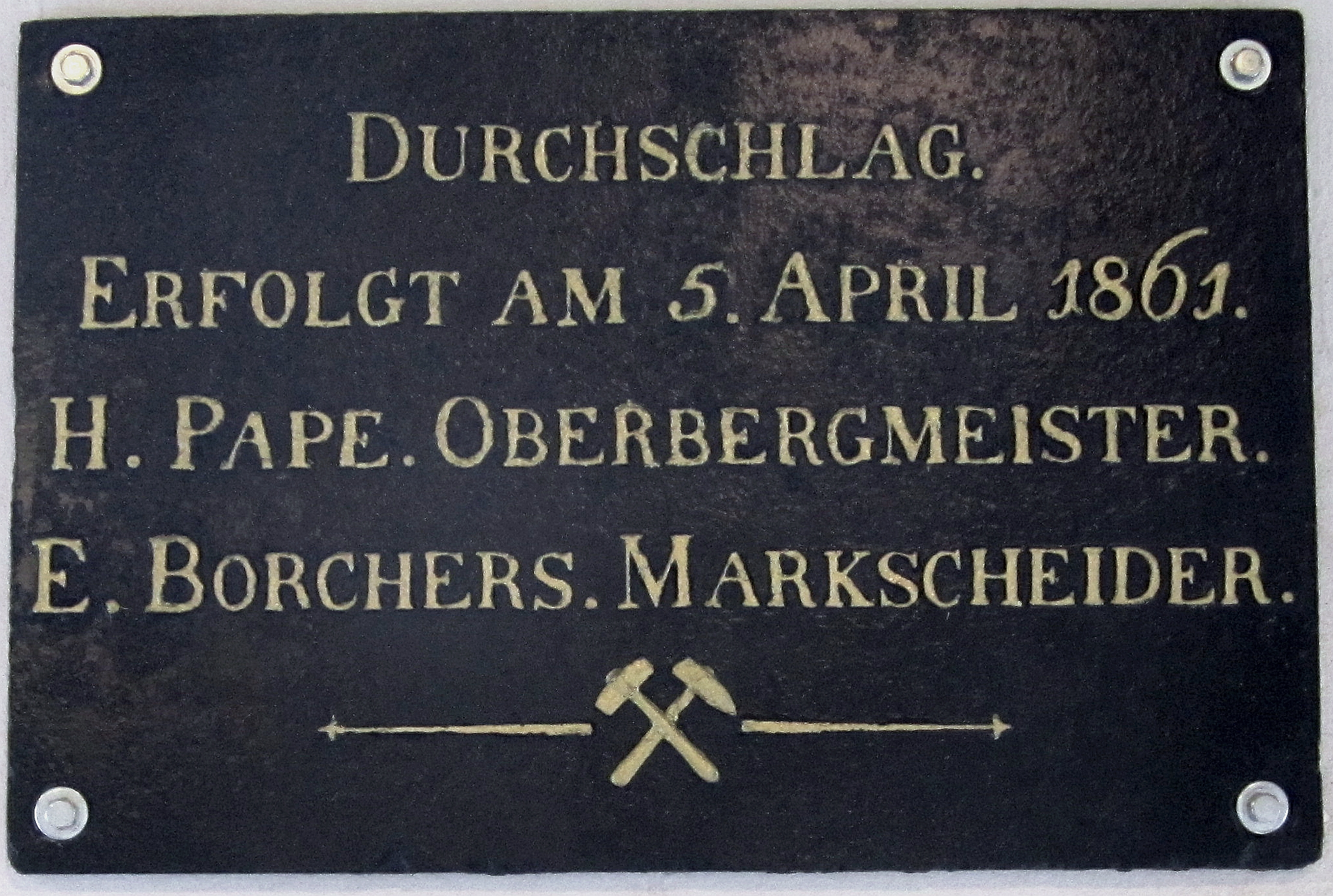 Durchschlagstafel des Ernst-August-Stollns im Bergbaumuseum Bad Grund (Knesebeckschacht). Niederschsen, Deutschland. Inschrift der Infotafel: "Durchschlag am 5. April 1861 Am 1. August 1859 begann man mit dem Auffahren des Ernst-August-Stollns vom Knesebeckschacht aus in Richtung Wiemannsbucht und am 15. August 1859 in Richtung Hilfe Gottes. Beide Örter wurden am 5. April 1861 mit den Gegenörtern zum Durchschlag gebracht. Die Entfernung vom Knesebeckschacht zum Durchschlagspunkt in Richtung Wiemannsbucht beträgt 149 2/8 Lachter (entspricht 286,56 m) und in Richtung Hilfe Gottes 113 3/8 Lachter (entspricht 217,43 m)."